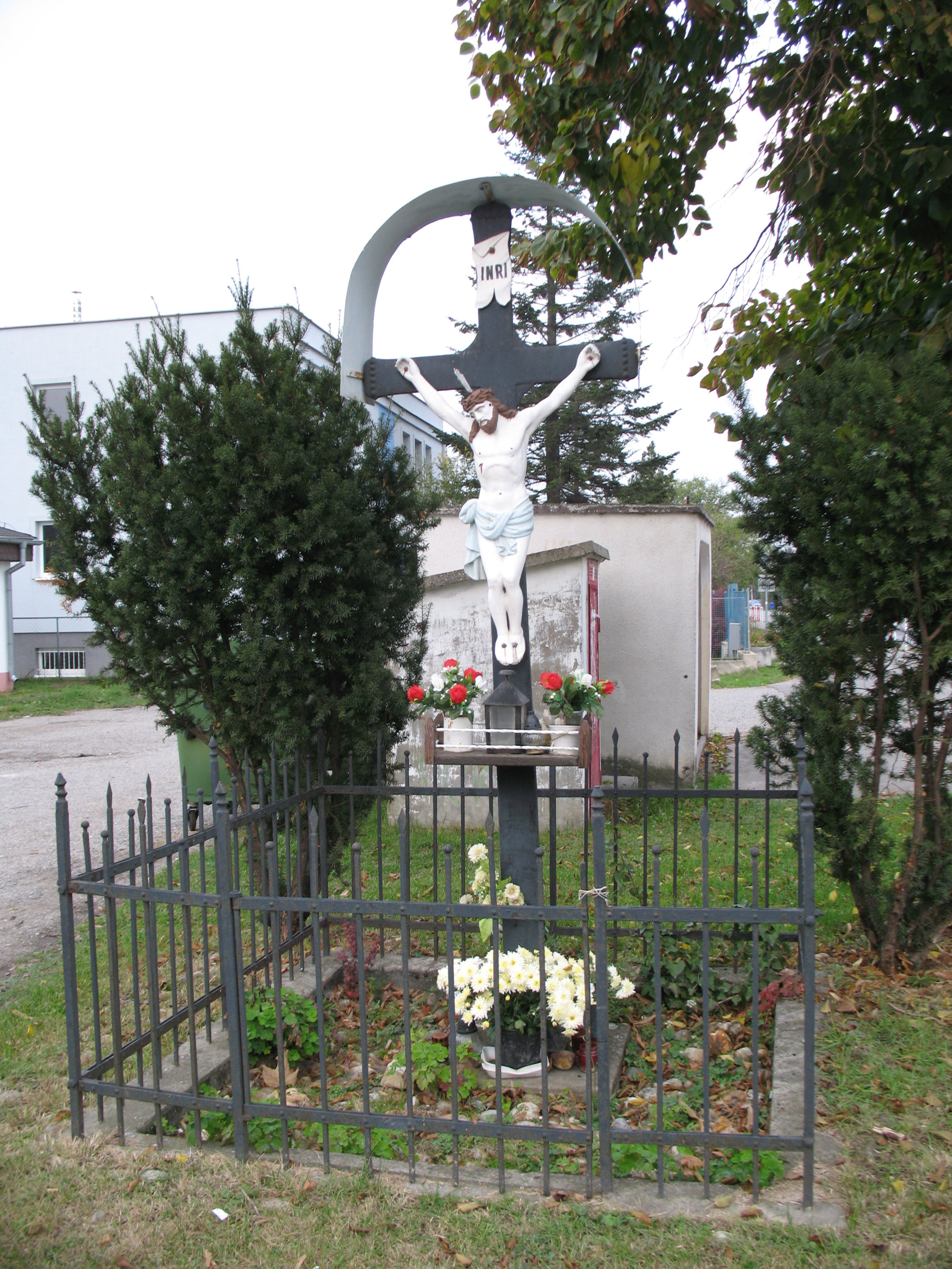 Úszor